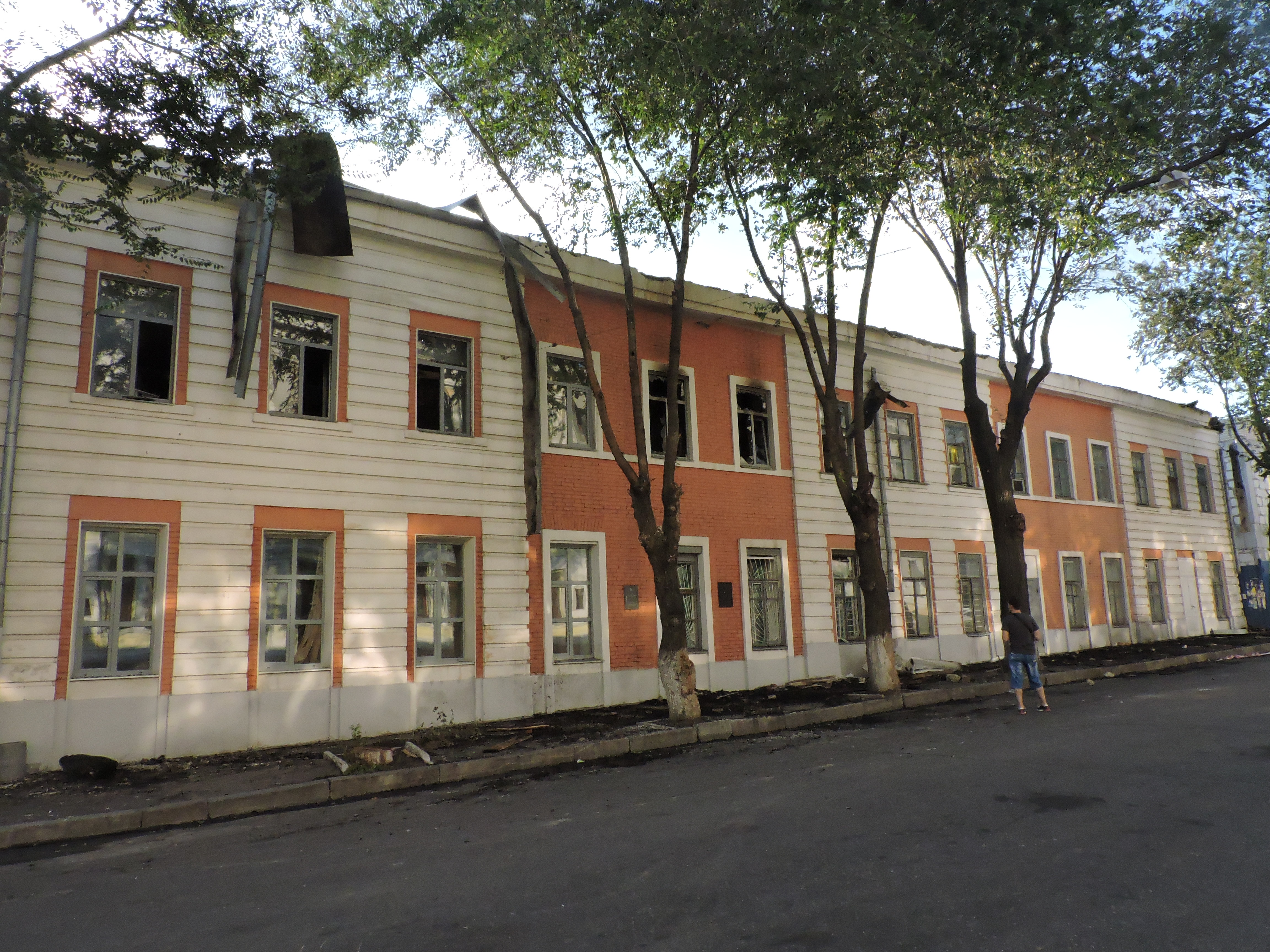 Хімічний корпус Харківського університету на вул. Університетській, 12, збудований у 1777, реконструйований та перебудований Є. Васильєвим 1804 та 1820 роках (нині корпус № 4 Української інженерно-педагогічної академії) після пожежі.Харків, 3 серпня 2018.Загальний вигляд будівлі з боку вулиці Університетської.